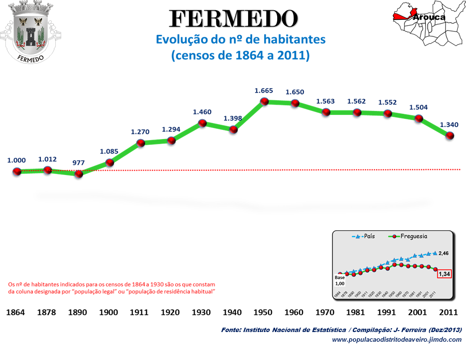 Evolução da População 1864 / 2011